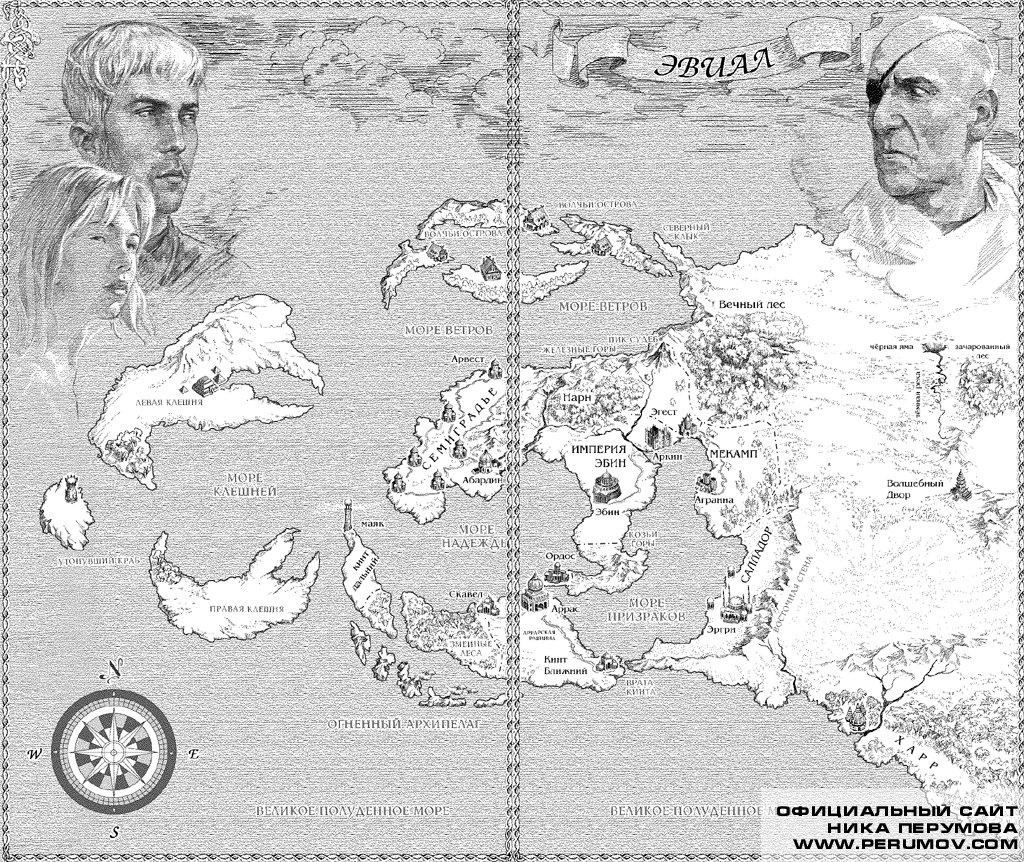 1024x862